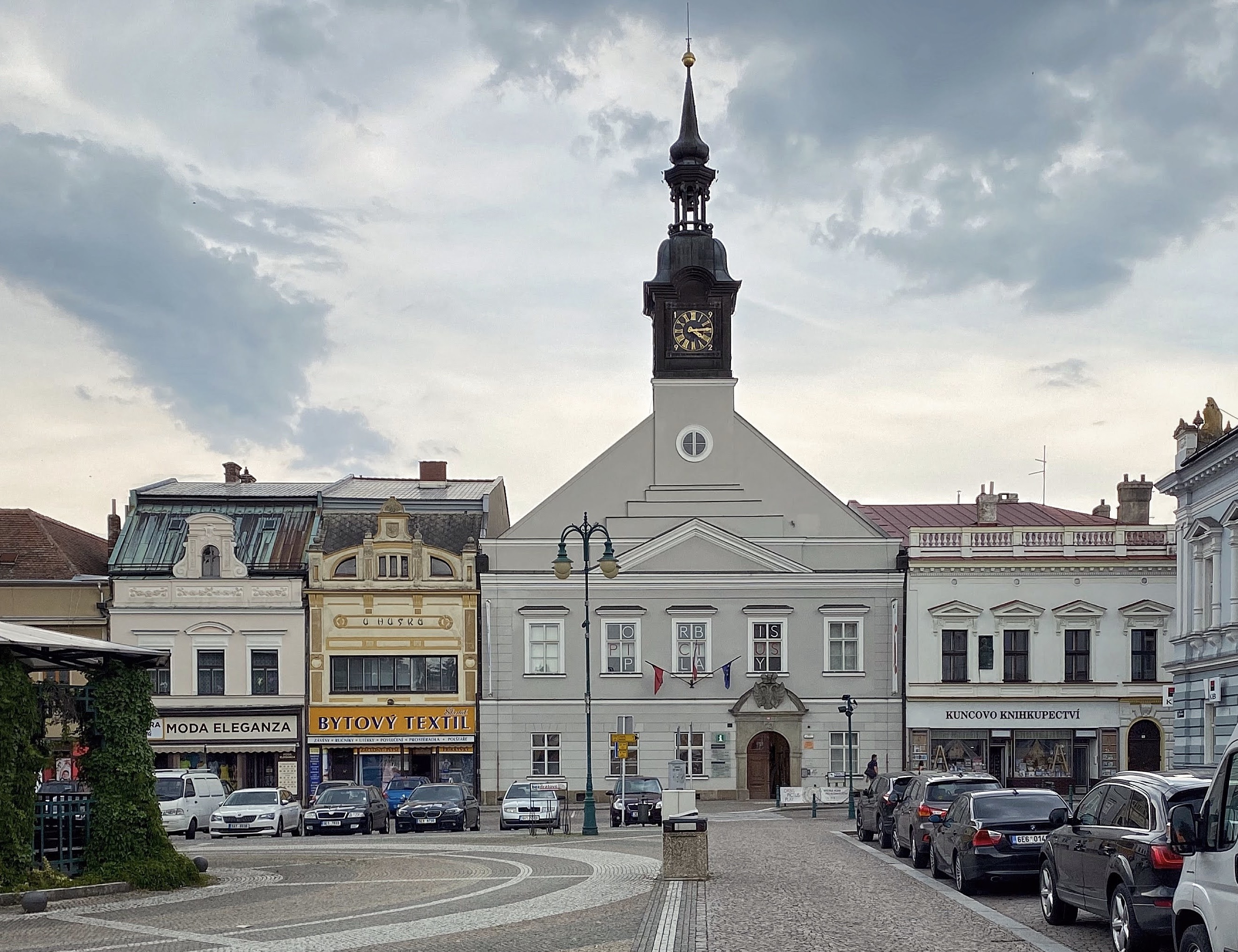 Náměstí ve Vysokém Mýtě.